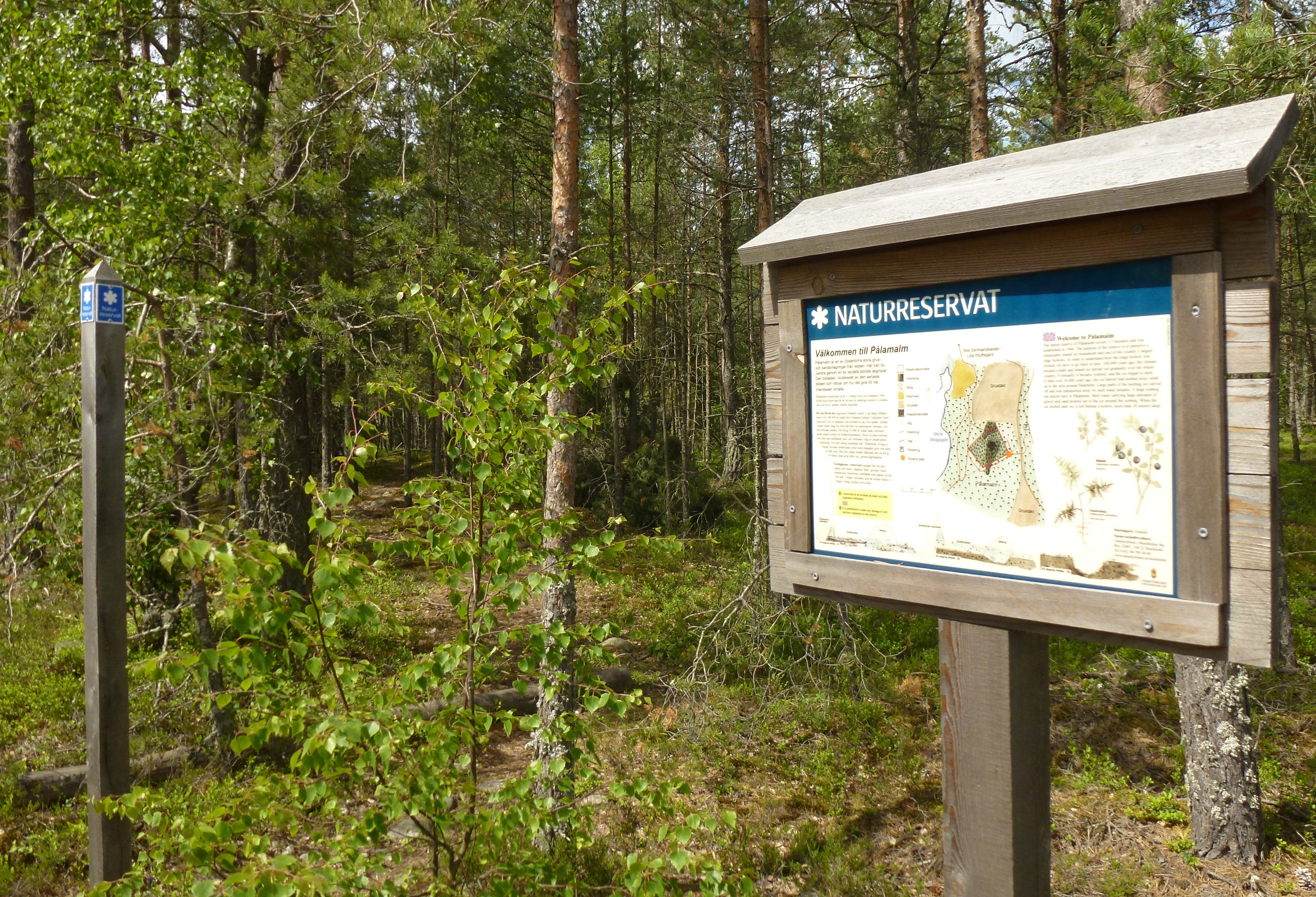 Pålamalms naturreservat, skylt